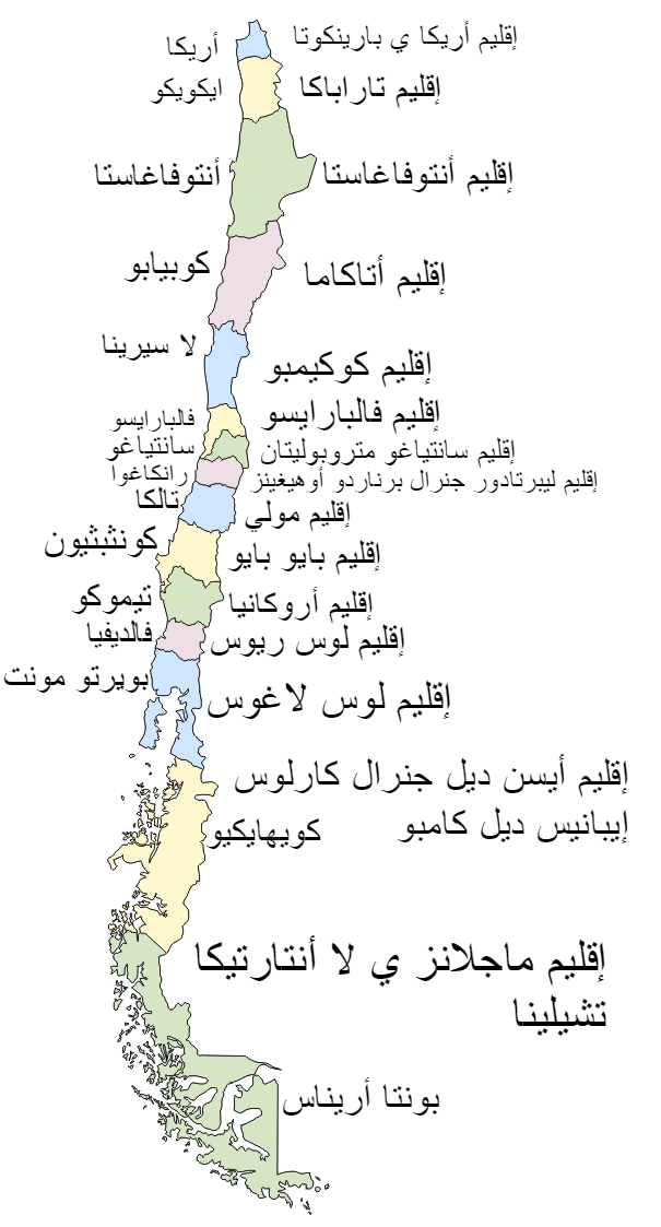 المدن والمناطق خريطة شيلي